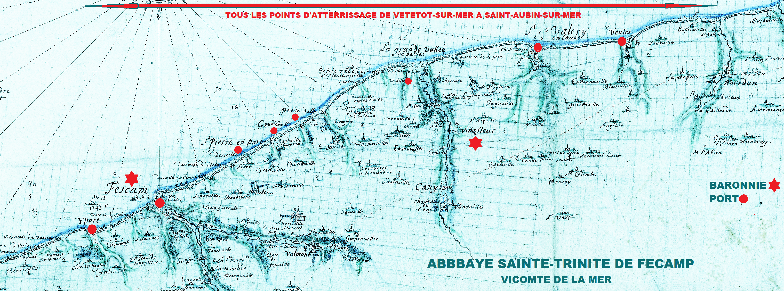 Abbaye de Fécamp, Vicomté de la mer (image du domaine public modifiée)